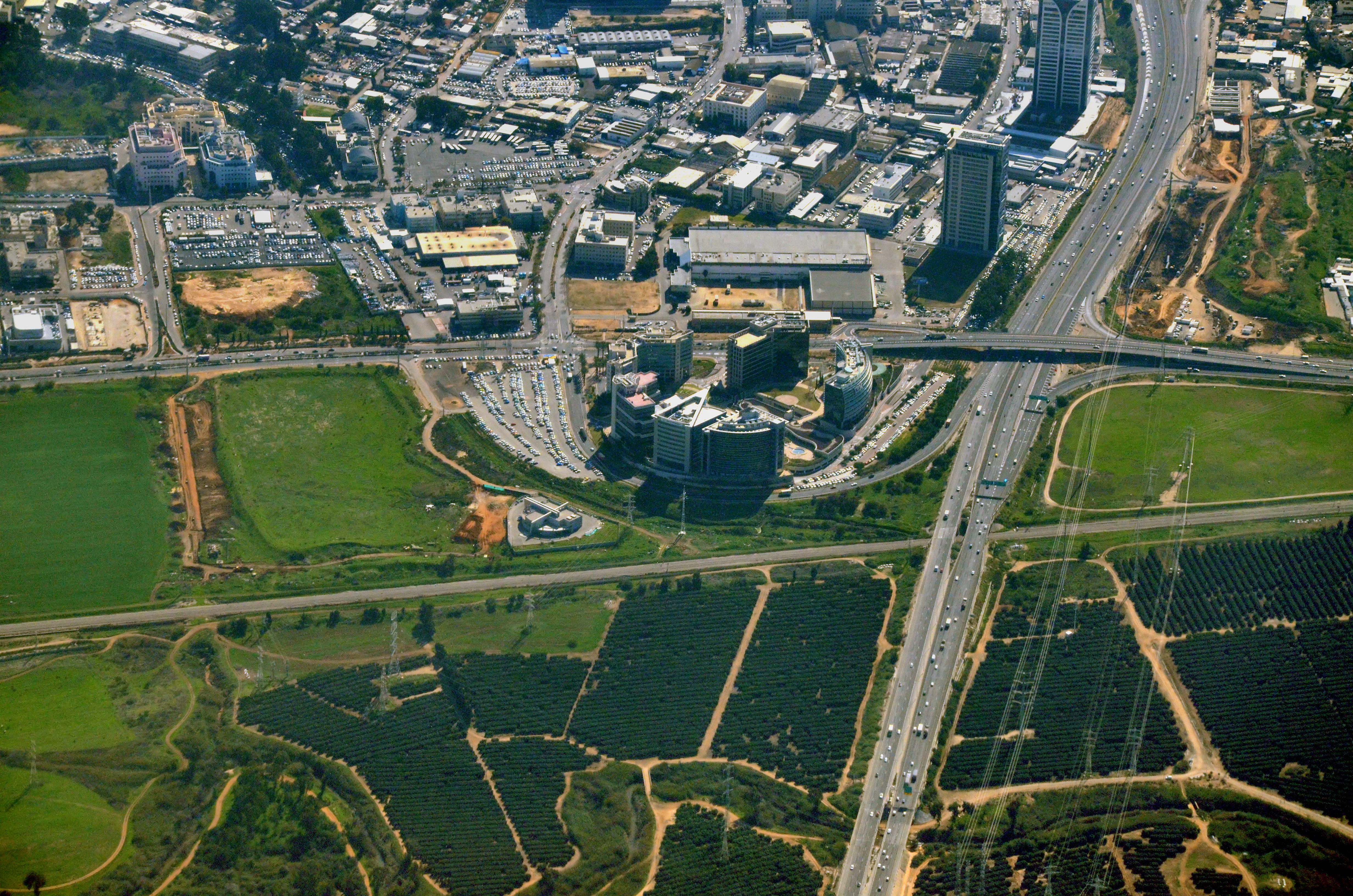 מבט מצפון לדרום